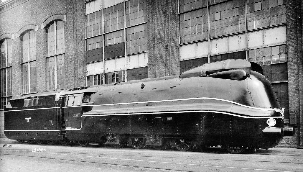 Werksbild der von Henschel gebauten Dampfmotor-Lokomotive für die Deutsche Reichsbahn, die dort die Nr 19.1001 erhielt.